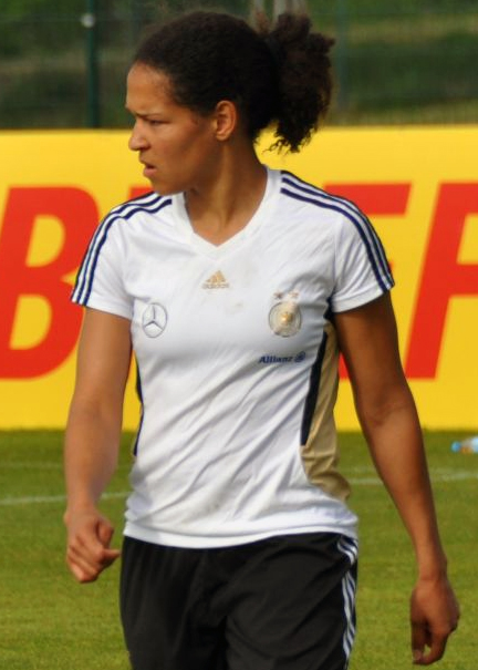 Célia Okoyino da Mbabi Cropped from File:Deutsche Frauen-Nationalmannschaft 7.jpg